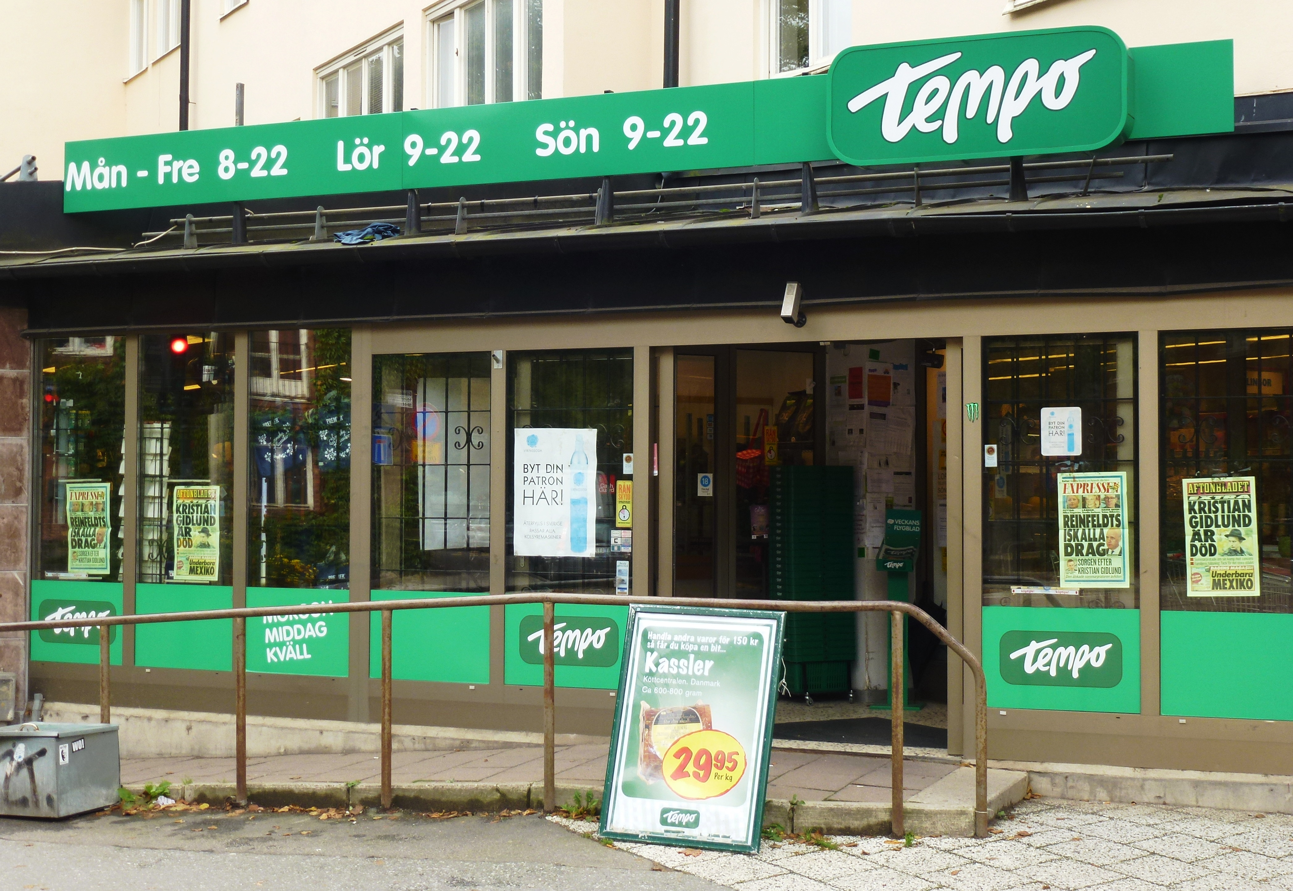 Tempo, Gröndalsvägen 22